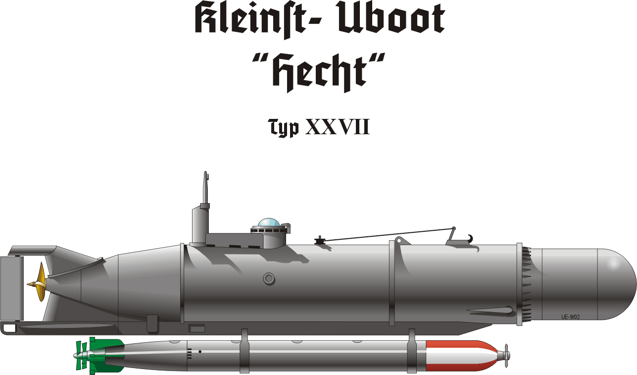 Zeichnung (Corel); Uwe Ernst